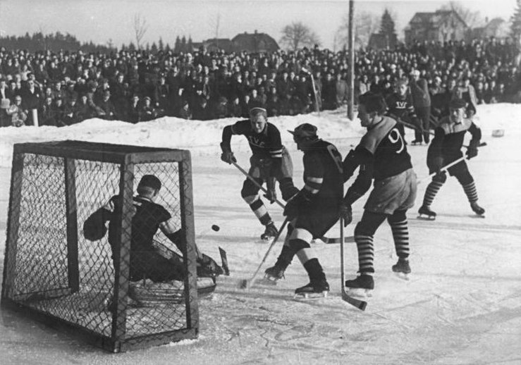 Wintersportmeisterschaften der sowjetischen Besatzungszone 1949, veranstaltet vom deutschen Sportausschuß Berlin in Oberhof. Der erste Schuß ins Berliner Heiligtum, geschossen von Sachsens Eishockey-Meister Frankenhausen-Pleiße. Aufn.: Illus Graf